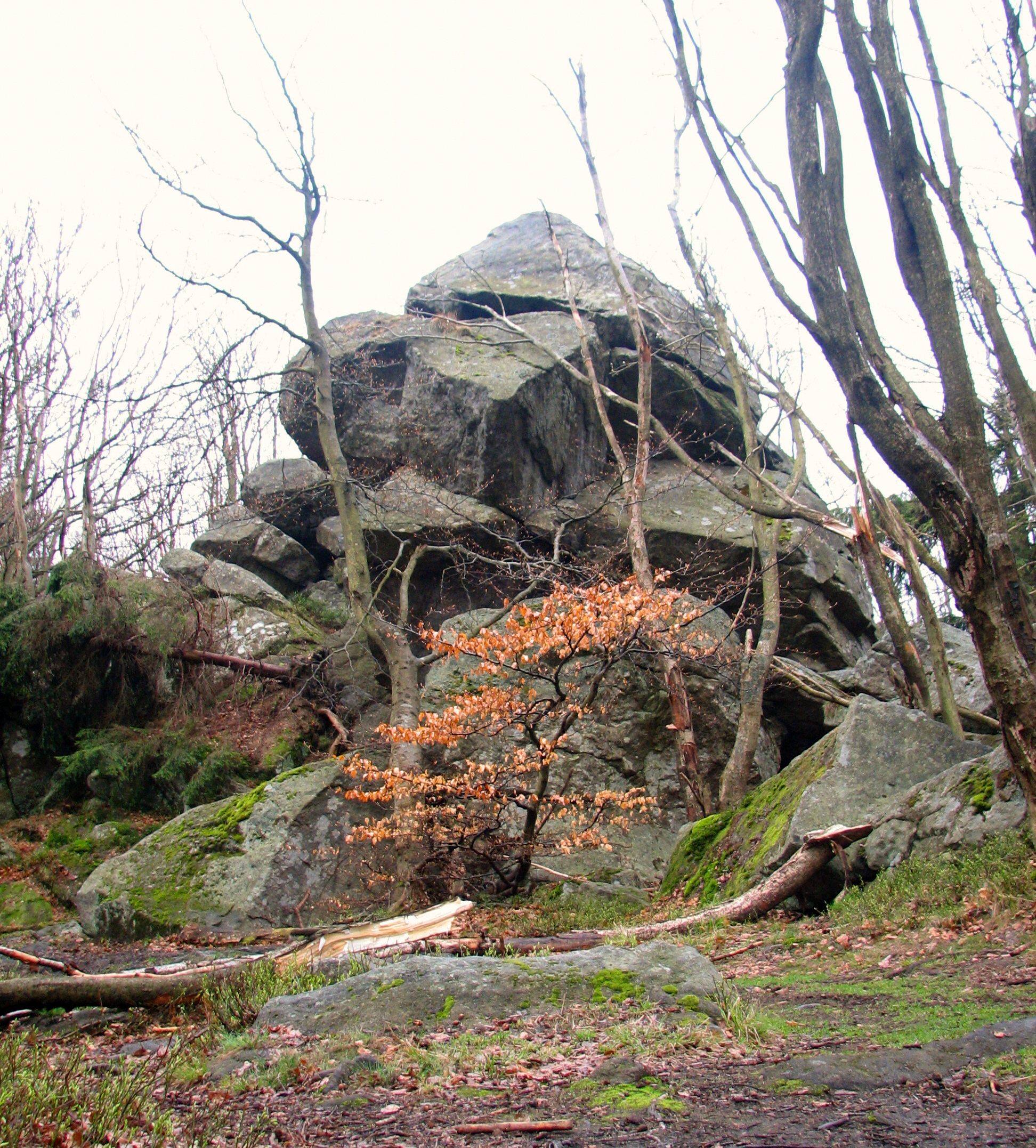 Rezerwat Bukowa Kalenica, Niemcy nazywali to miejsce Sonnen Steine